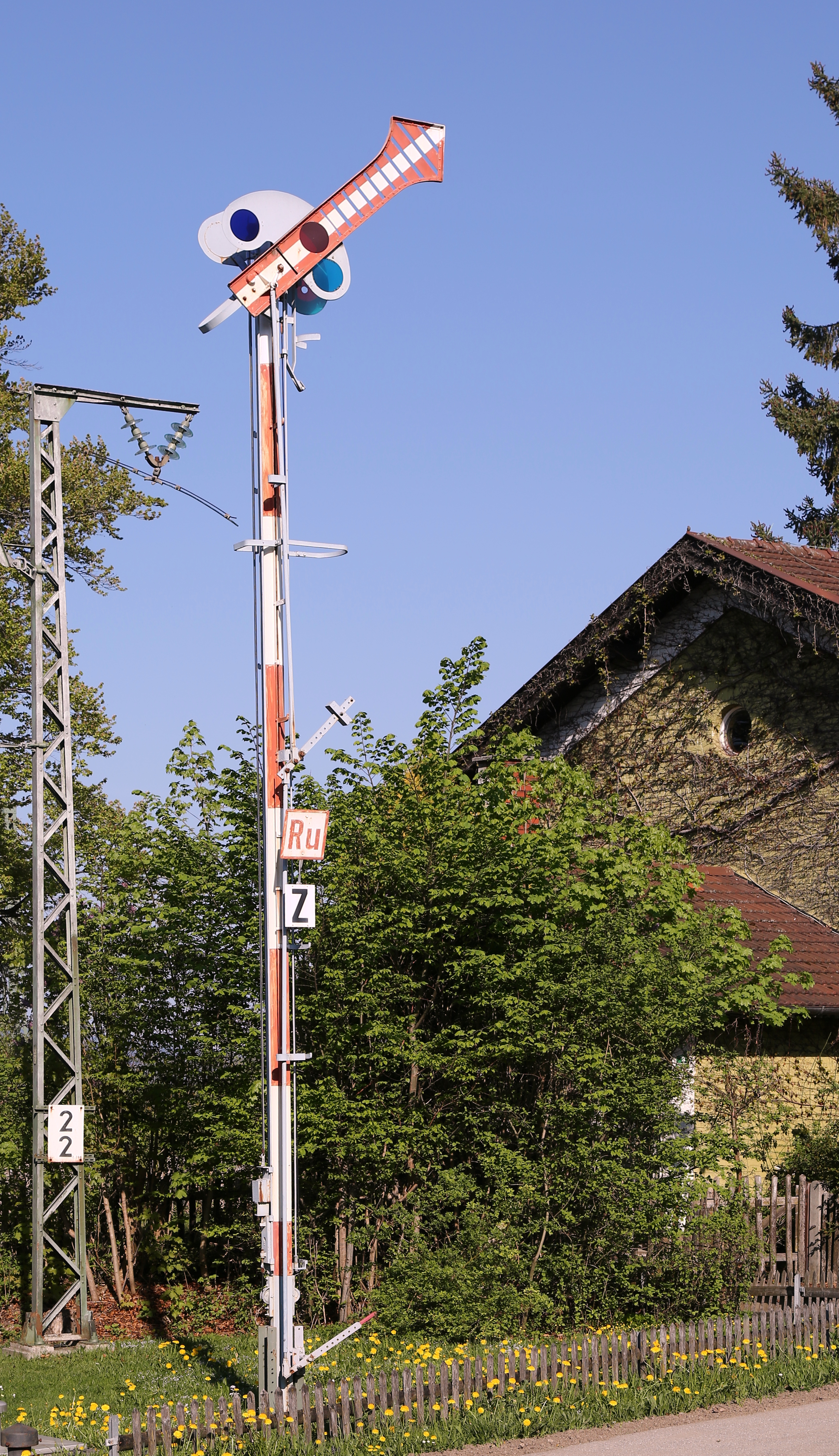 Historisches Bayerisches Hauptsignal vor dem Bahnhof in Murnau